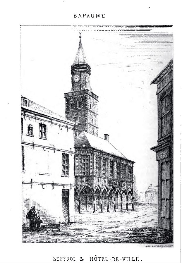 L'hôtel de ville de Bapaume tel qu'il était au milieu du XIXe siècle